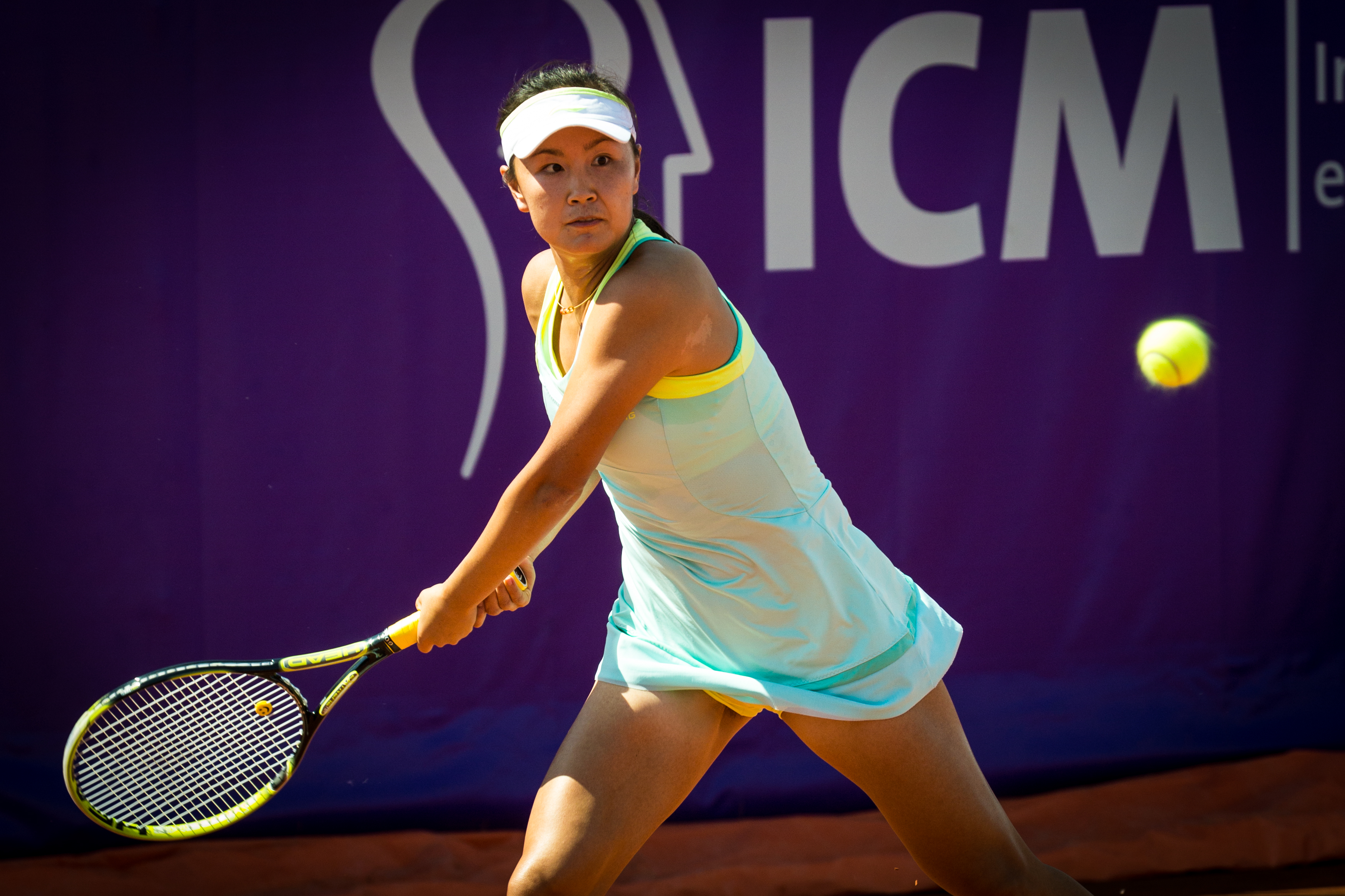 Peng Shuai (chinois simplifié : 彭帅 ; chinois traditionnel : 彭帥 ; pinyin : Péng Shuài), née le 8 janvier 1986 à Xiangtan, est une joueuse de tennis chinoise.